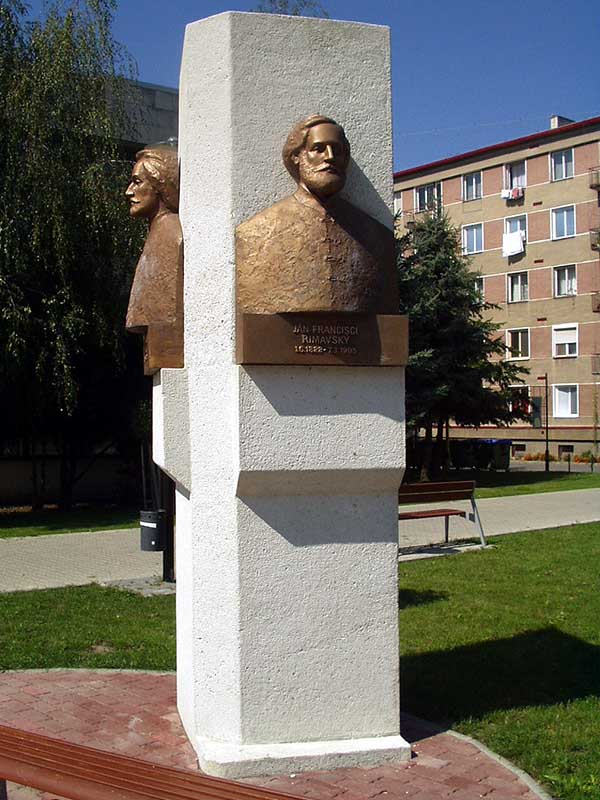 A statue of Ján Francisci Rimavský.